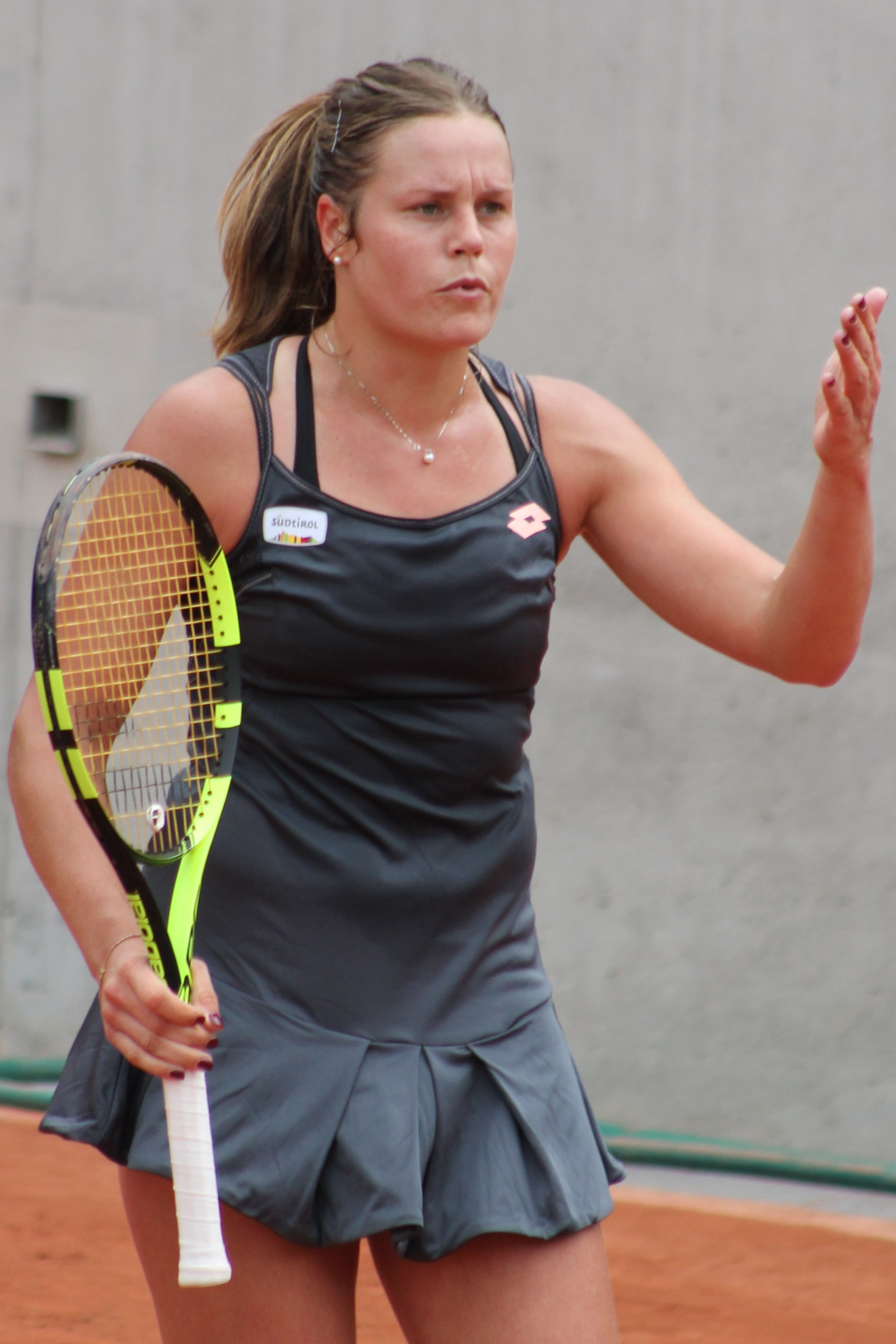 Knapp RG16 (9)